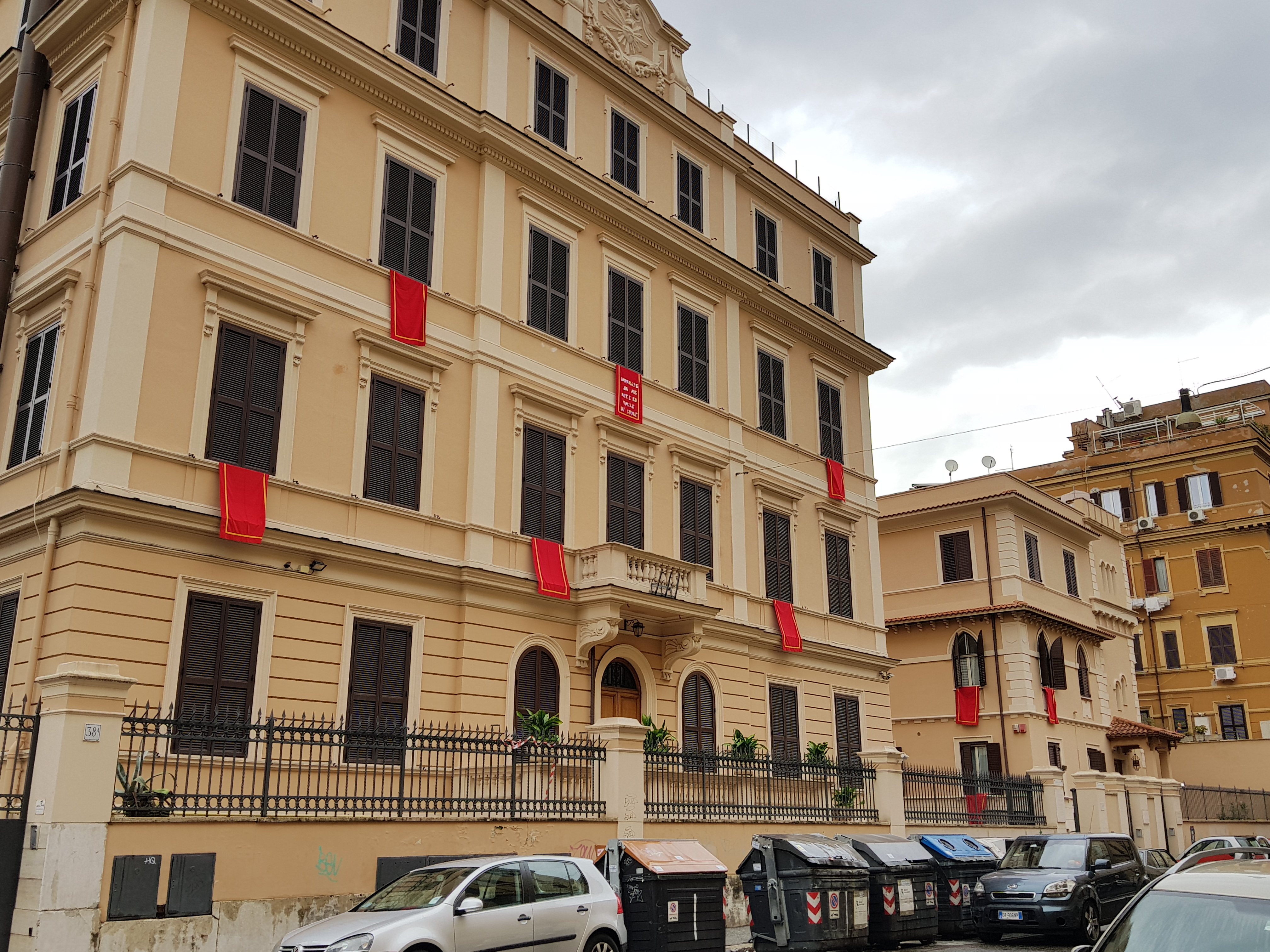 Das Generalat der Apostole del Sacro Cuore di Gesù in der Via Germano Sommeiller 38,00185 Roma.